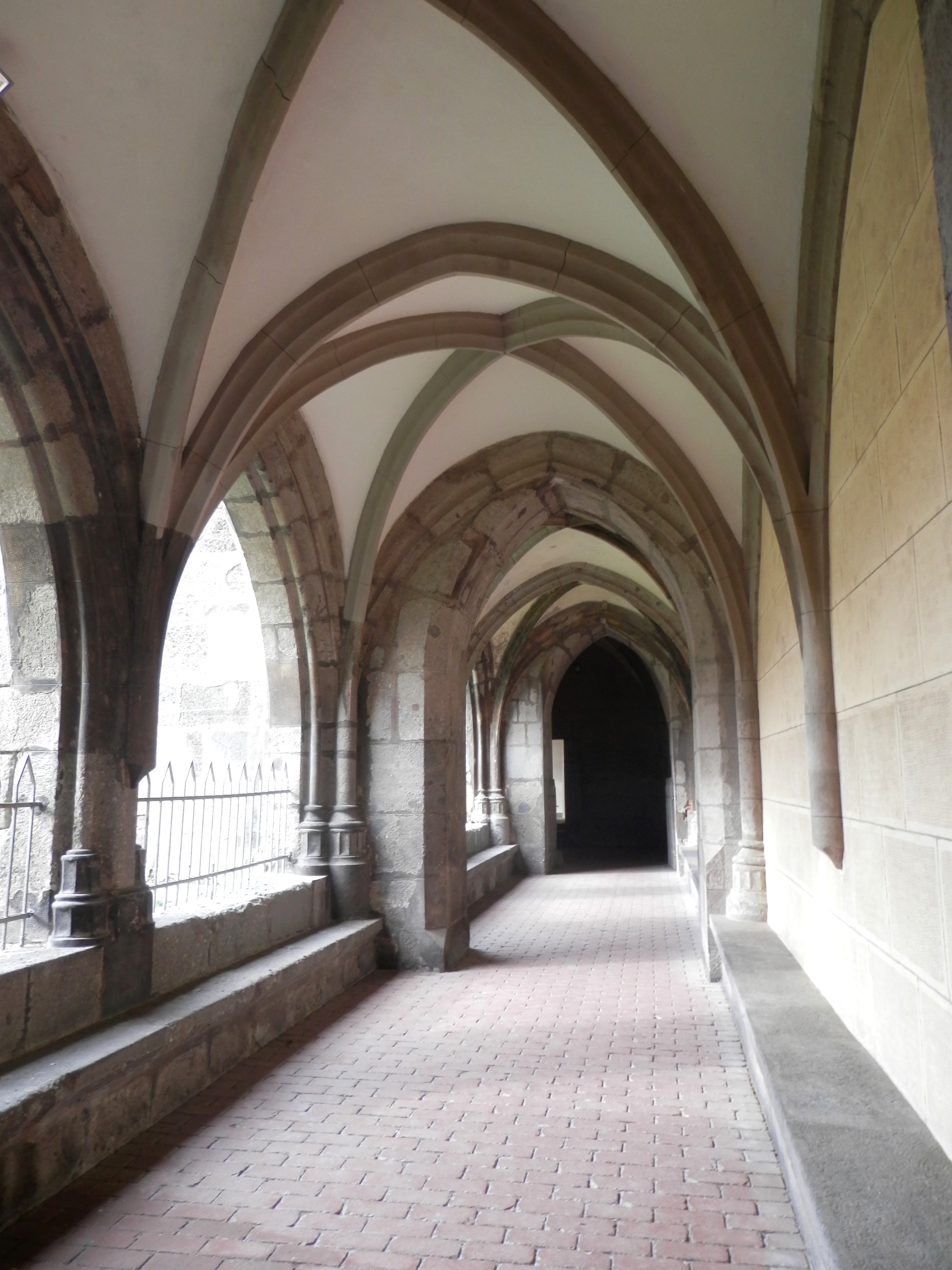 Národná kultúrna pamiatka, Benediktínsky kláštor Hronský Beňadik 19 Slovakia52 Doba vzniku druhá polovica 11. storočia. Prevládajúci sloh barok. Obec Hronský Beňadik. Okres Žarnovica. Slovensko. Object location48° 20′ 41.78″ N, 18° 33′ 27.54″ E